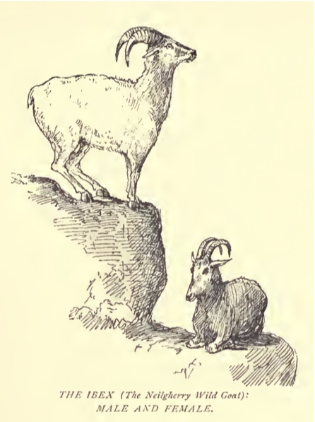 Douglas Hamilton, Nilgiri Tahr pair